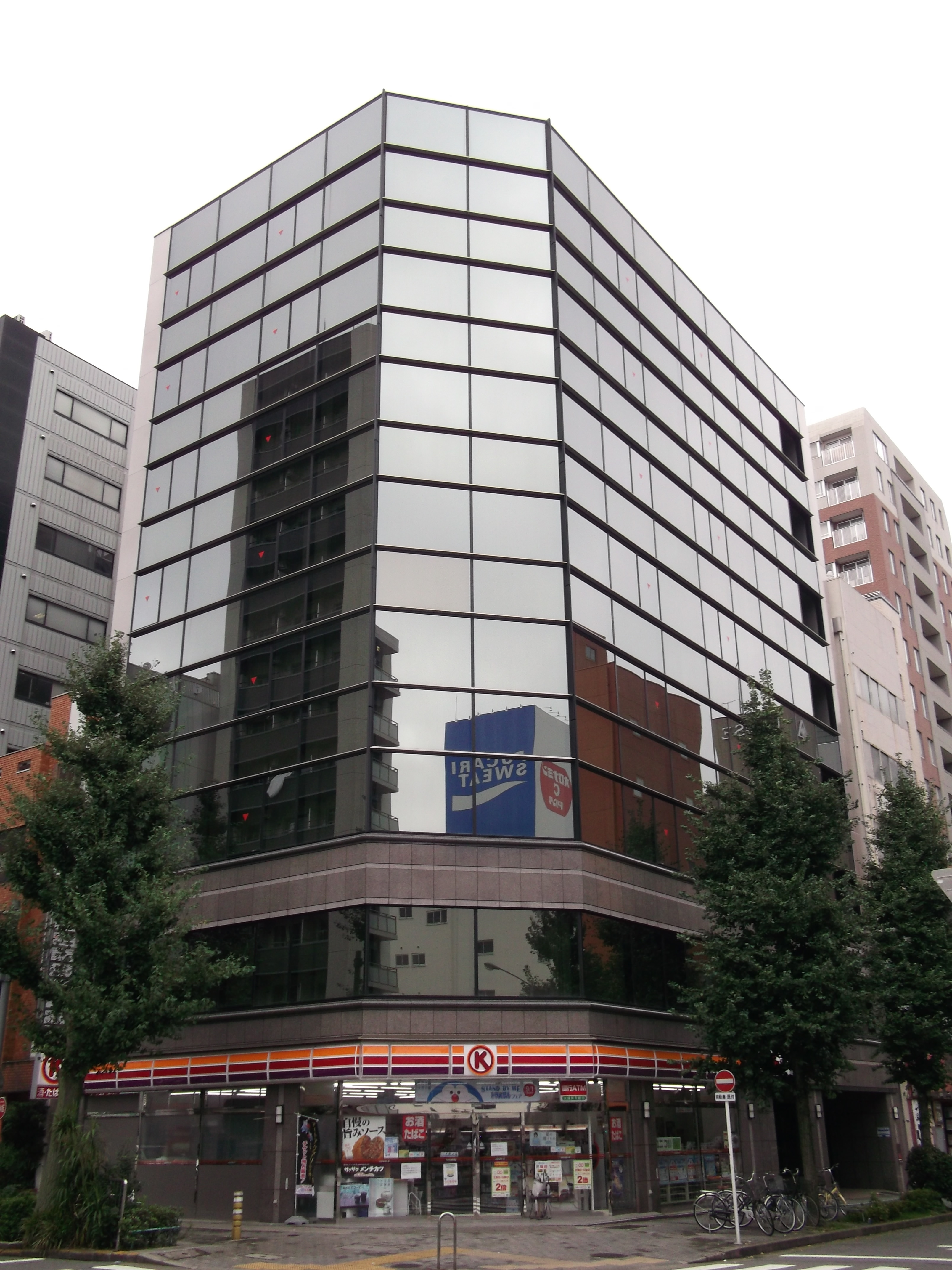 名古屋市中区丸の内三丁目の第16KTビルを北西角から撮影